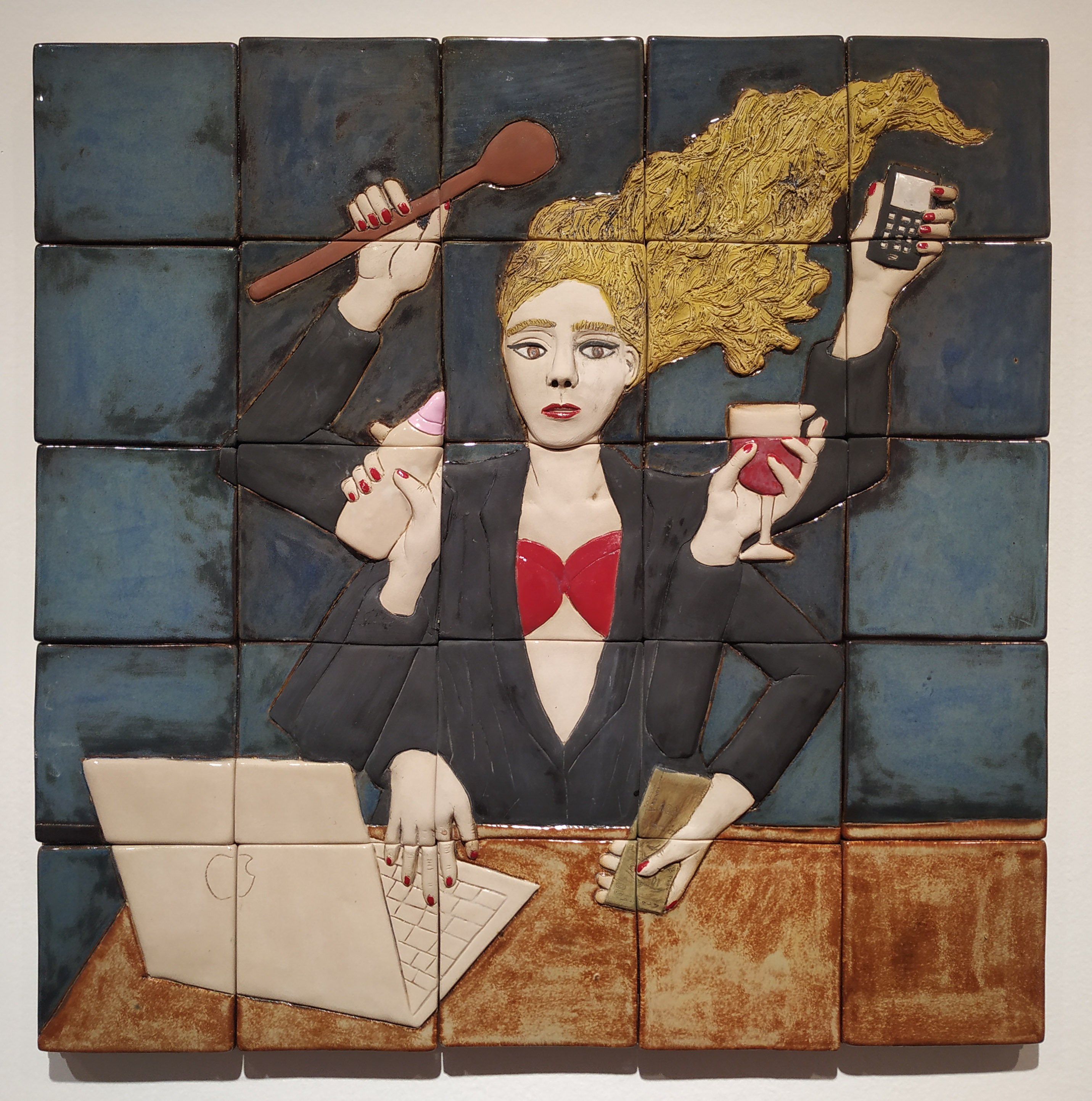 Obra en relieve de cerámica cocida